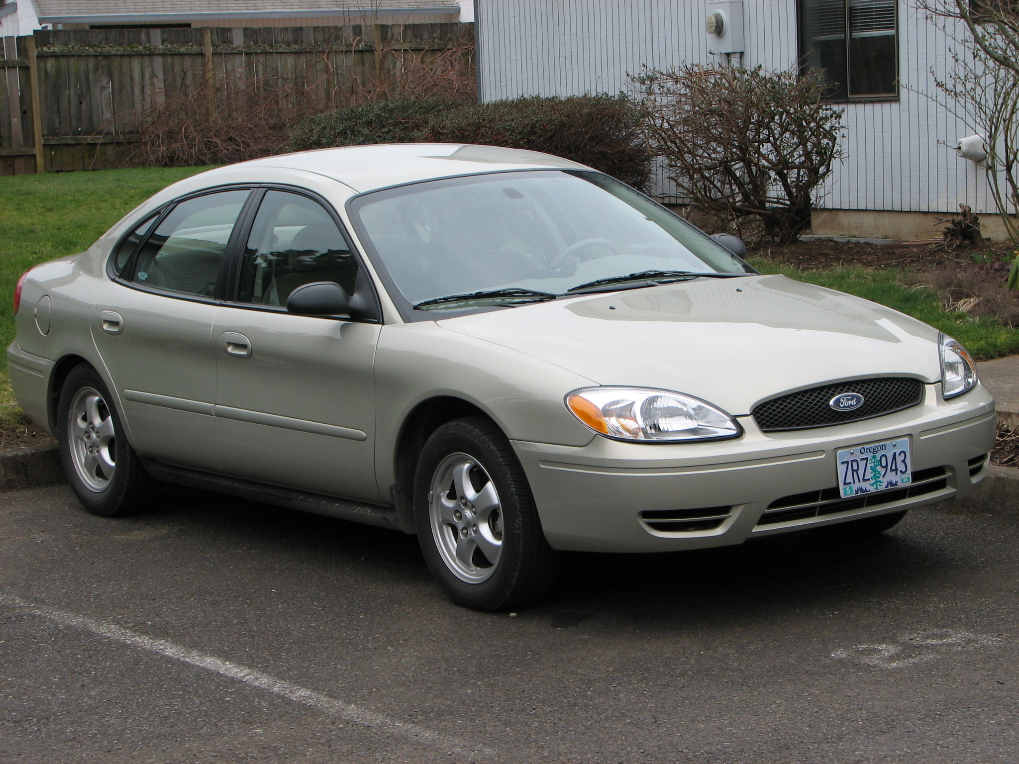 Ford Taurus model 2005